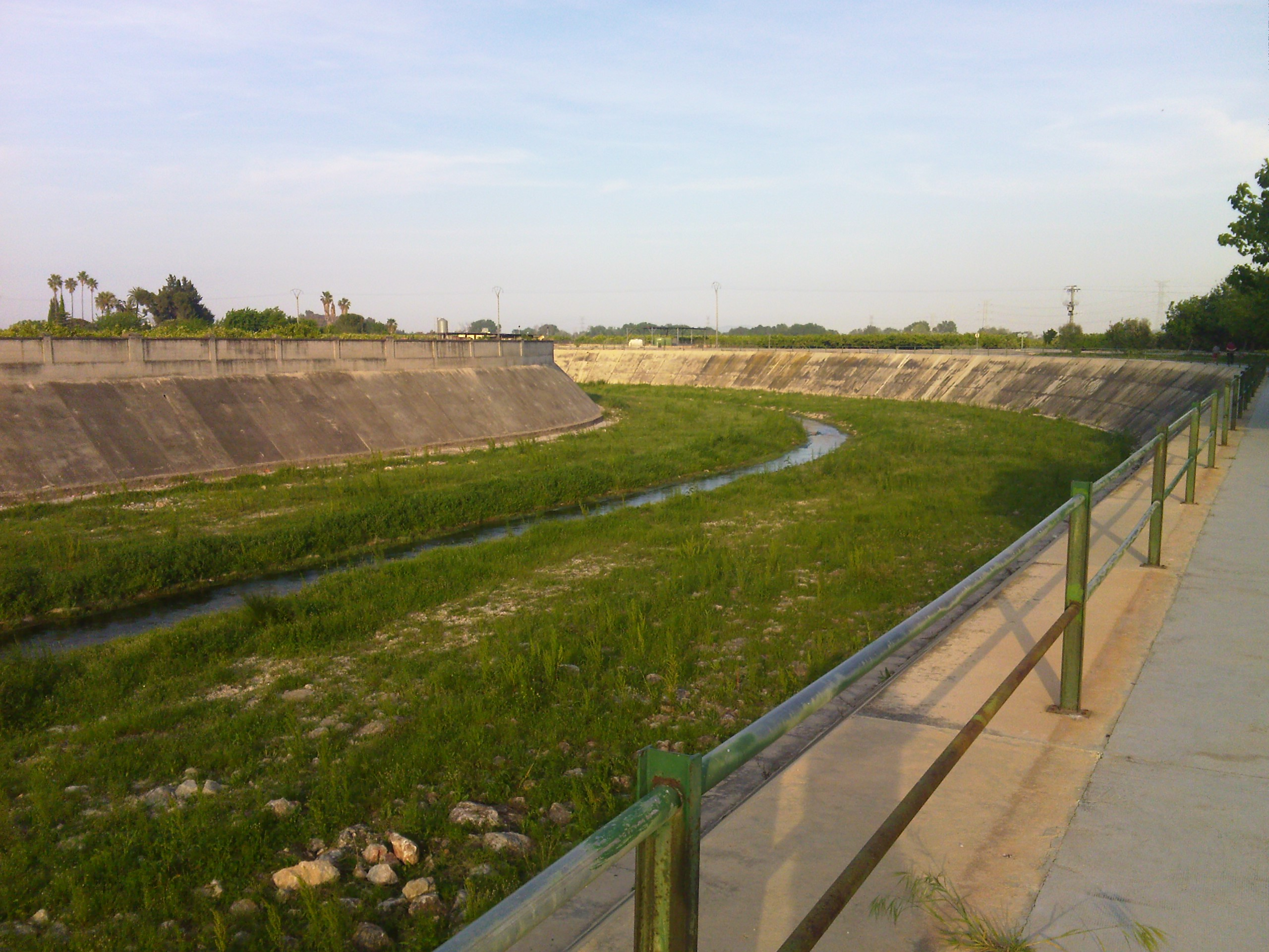 El riu magre al seu pas per Algemesí.